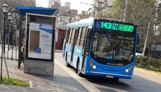 Interno 4423 de la empresa Rosario Bus, prestataria del servicio de la línea 143, en sus variantes "Negra" y "Roja".